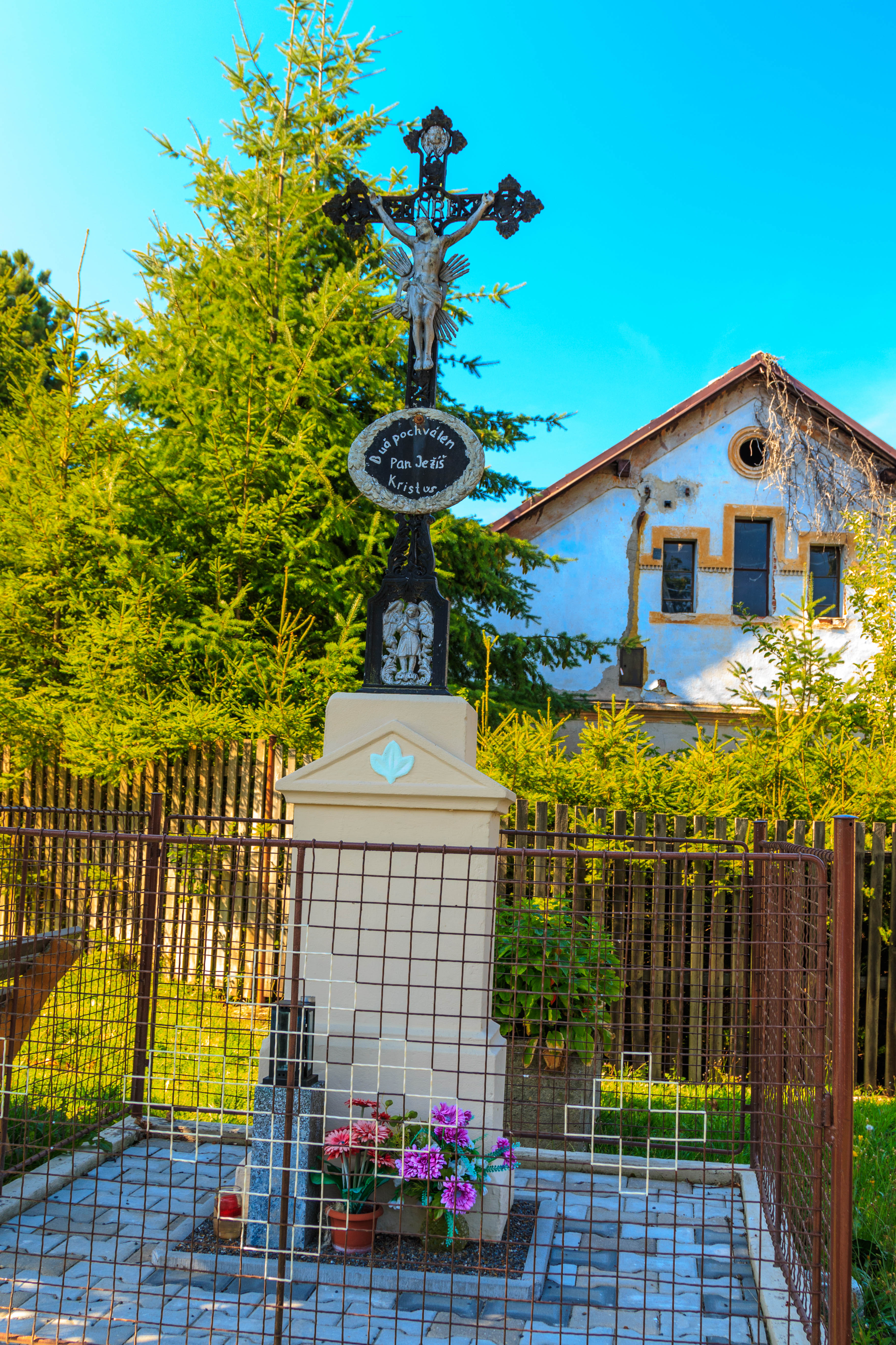 Chlum u Hluboké křížek